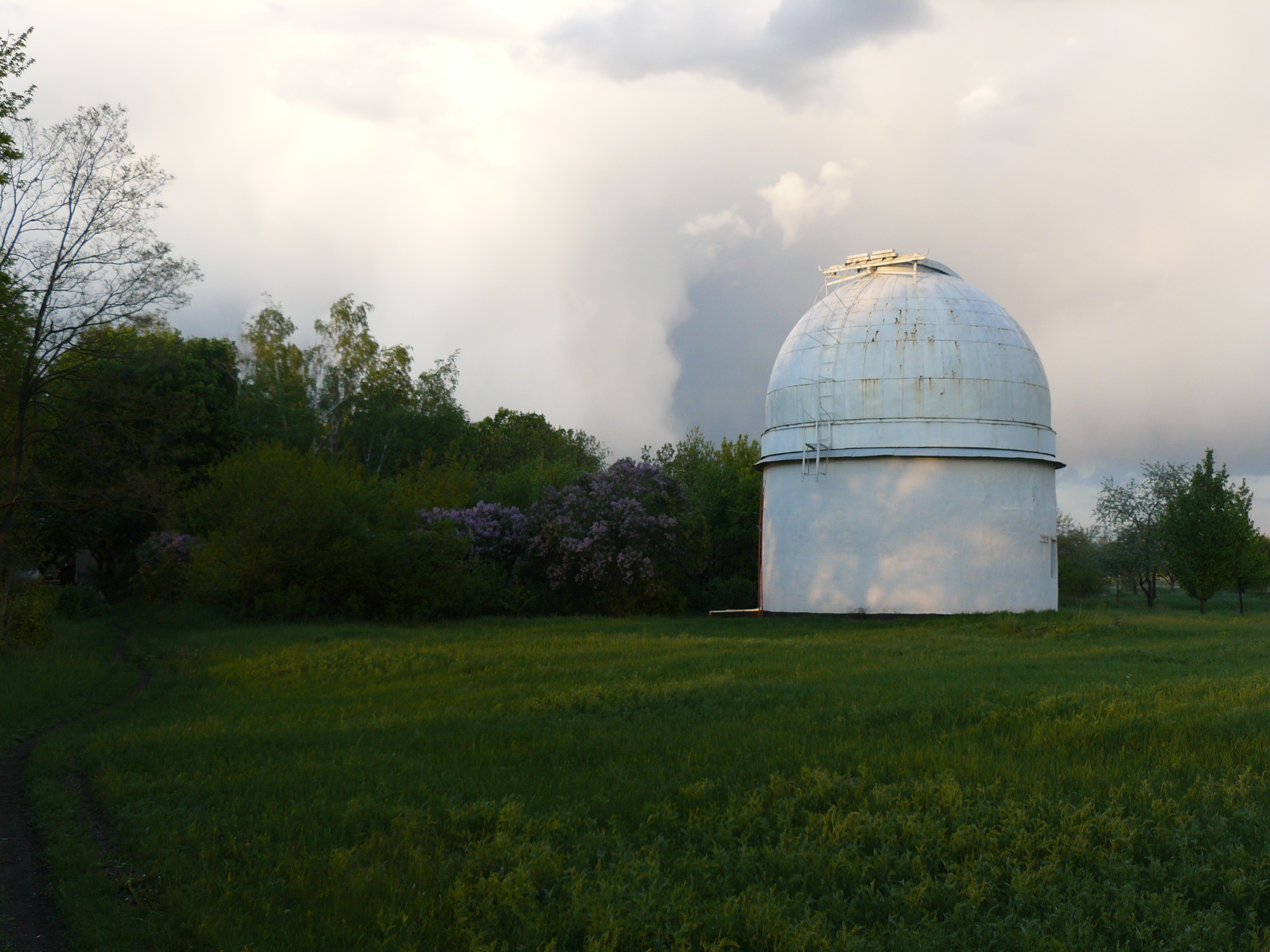 Купол 70-см телескопа. Обсерватория Граково, Чугуевский район Харьковской области.